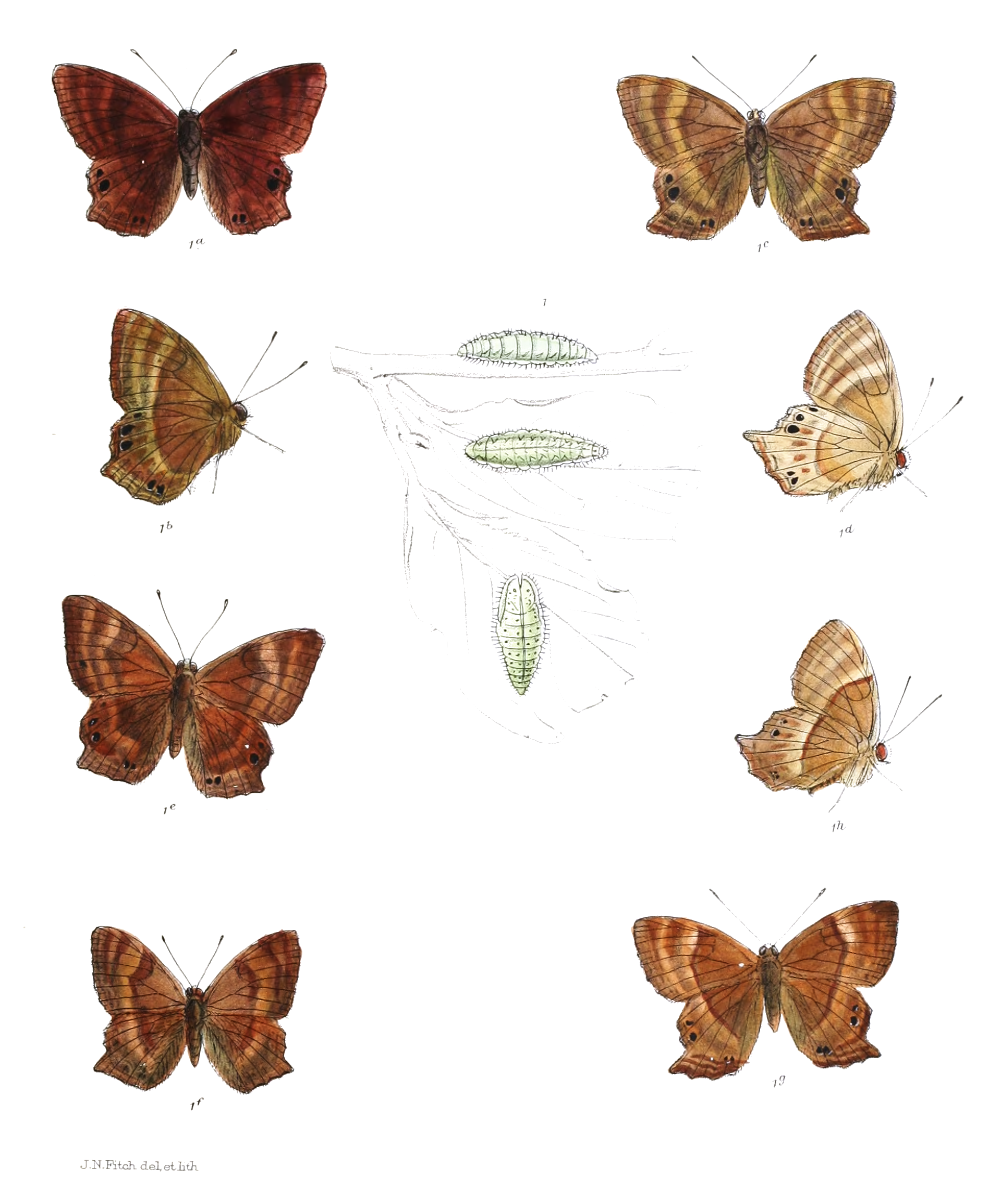 Abisara kausambi